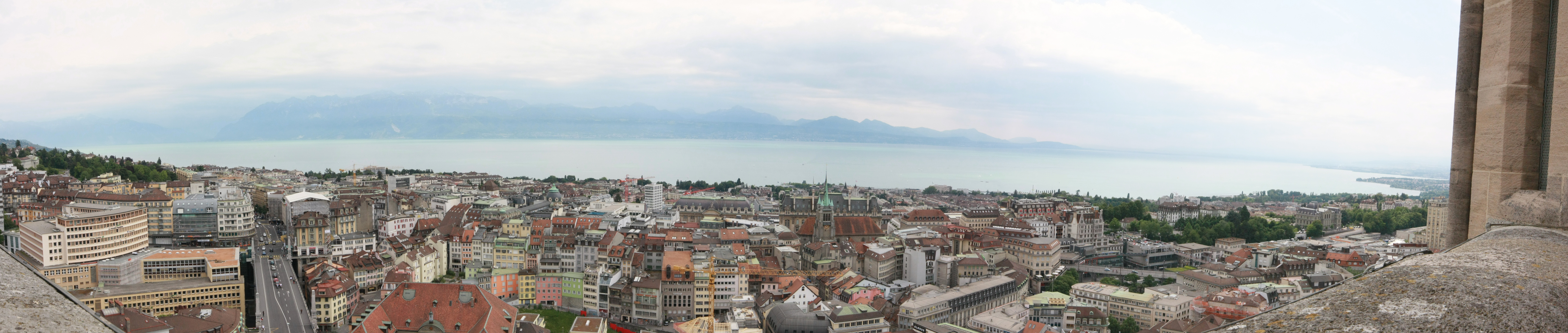 Panorama de Lausanne, image prise depuis le sommet de la Cathédrale de Lausanne.